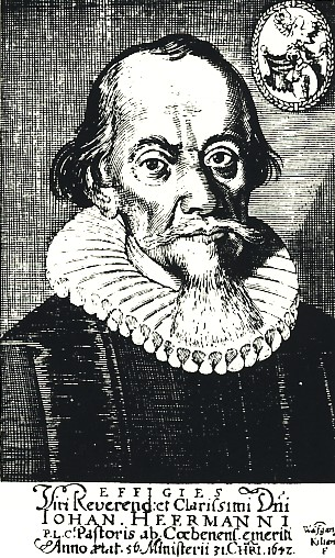 Pfarrer und Schriftsteller Johann Heermann.